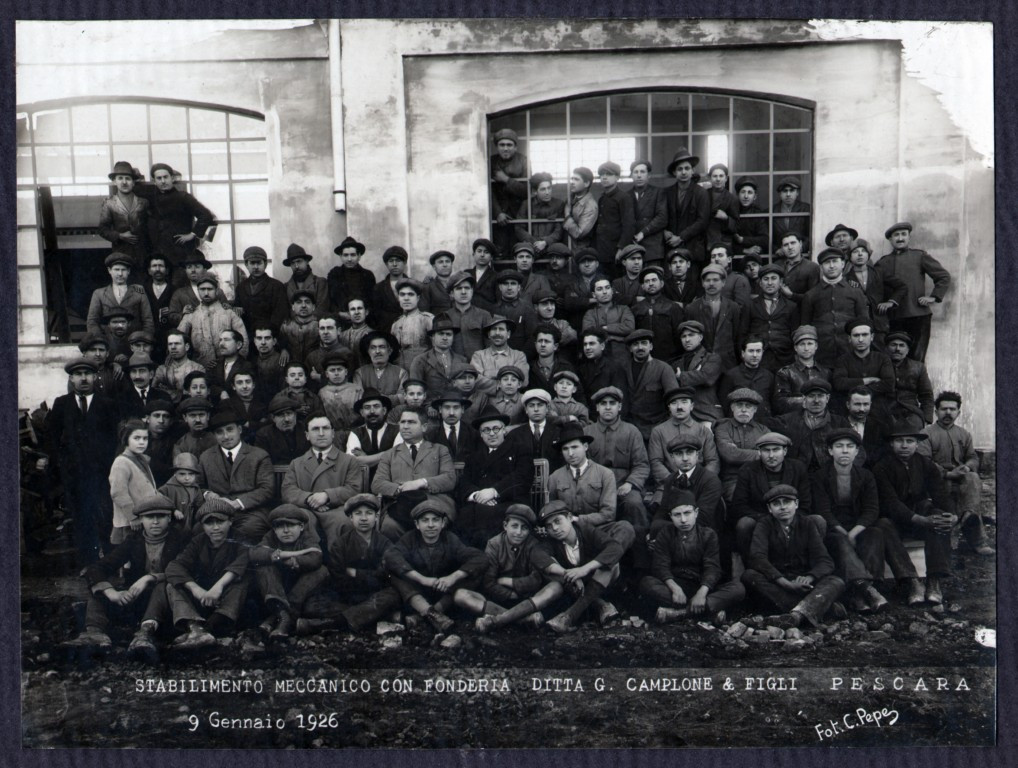 Fotografia di gruppo dei dirigenti e degli operai della fonderia Camplone, scattata dal fotografo C. Pepe, Pescara 9 gennaio 1926. In seconda fila sono riconoscibili da sinistra: l'ing. Corradino D'Ascanio, l'imprenditore Giuseppe Camplone e i suoi fratelli (AS Pescara, Archivio privato D'Ascanio Corradino, b. 2, fasc. 41, n. 1)